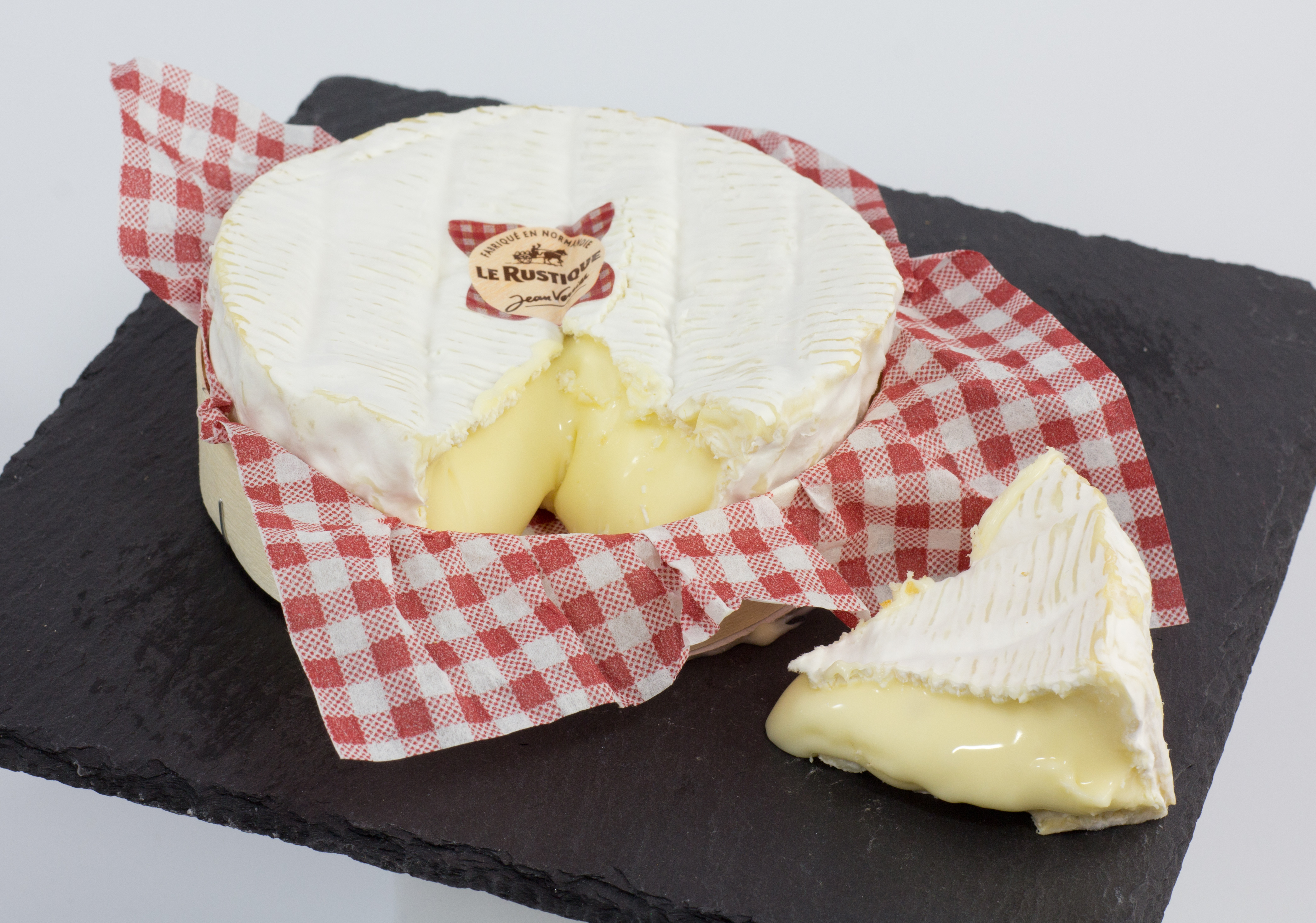 Le rustique